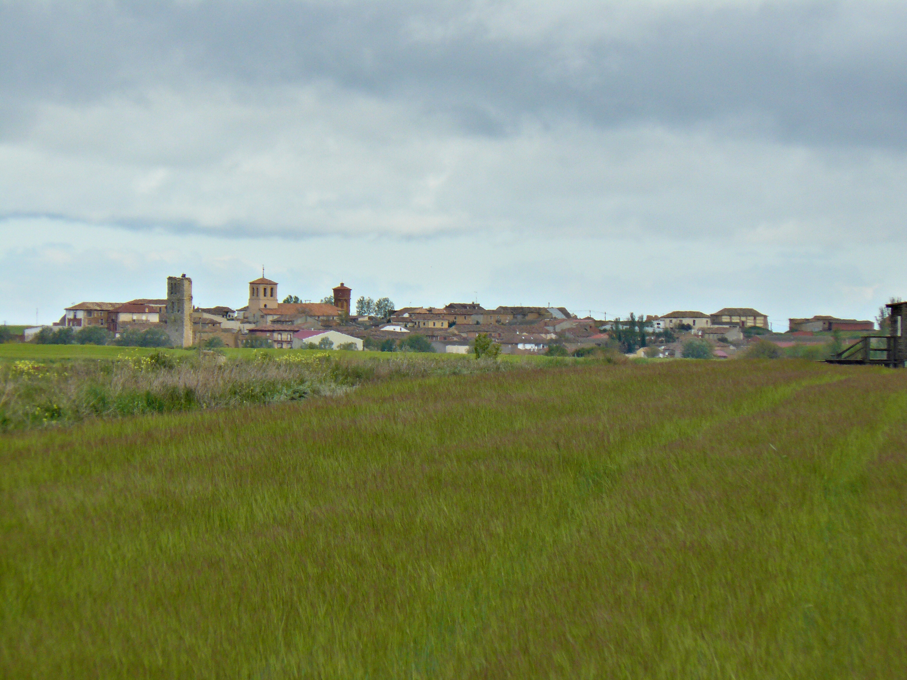 Tamariz de Campos visto desde el canal de Castilla.